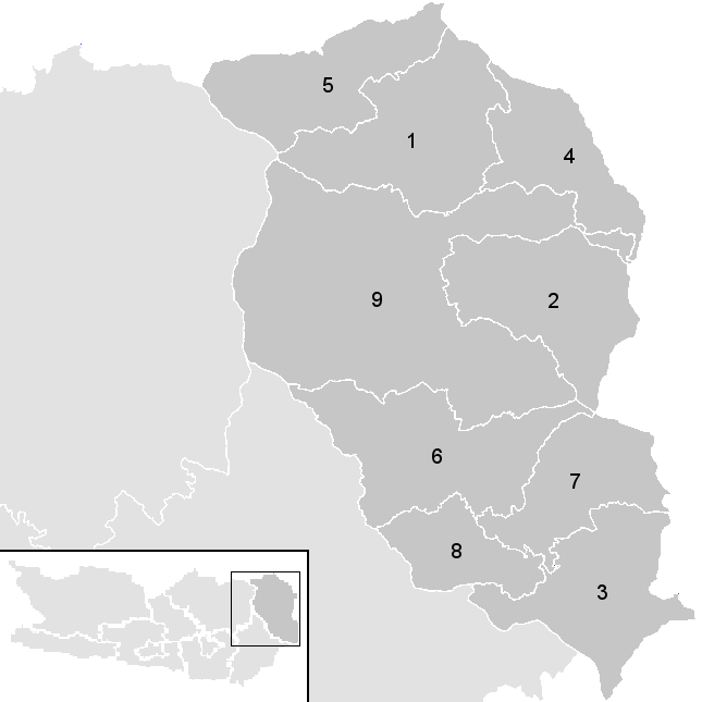 Leere Karte mit den Gemeinden im Österreichischen Bezirk Wolfsberg